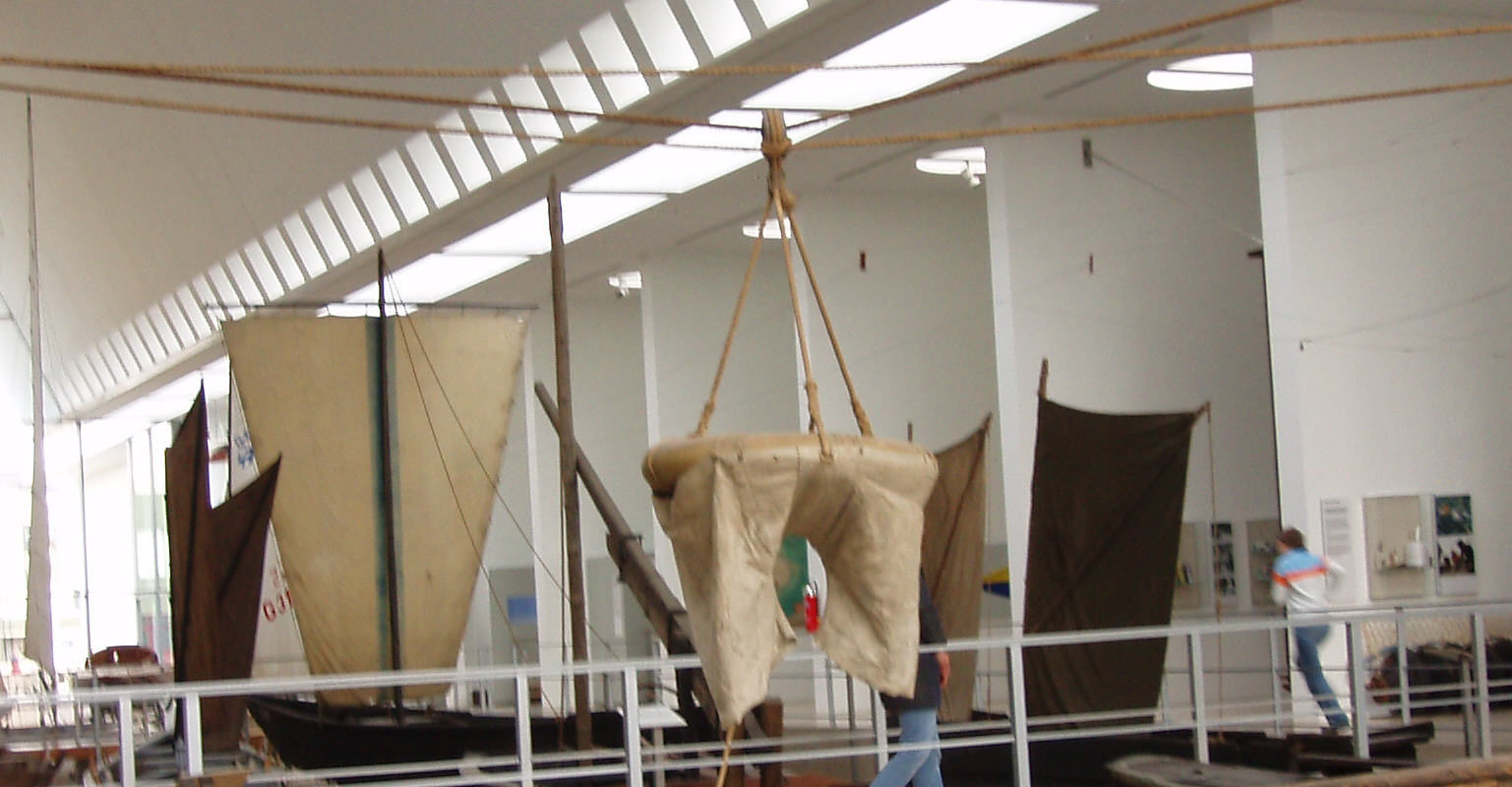 Historische Hosenboje